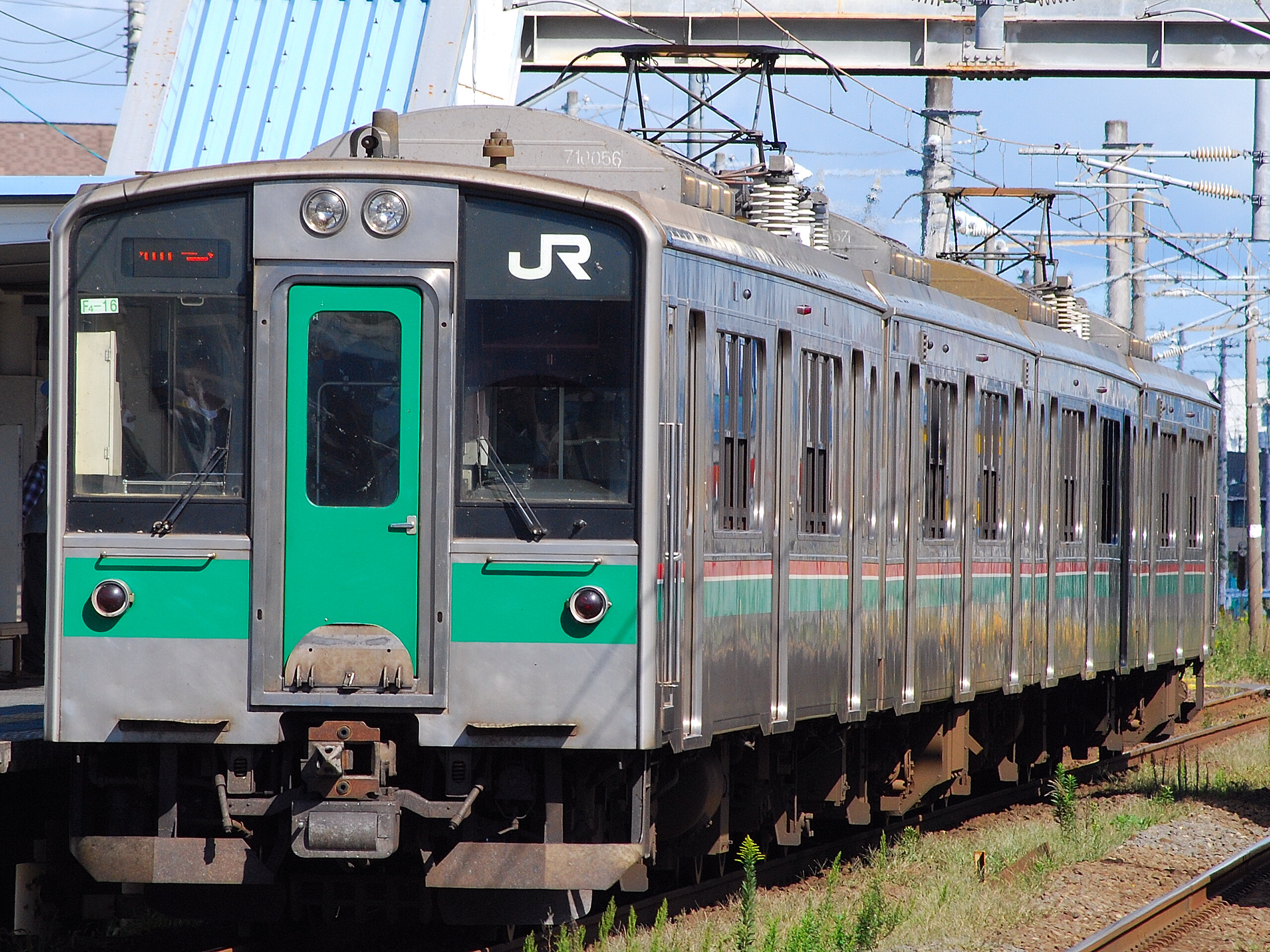 701系、F4-16編成 （館腰駅で撮影）